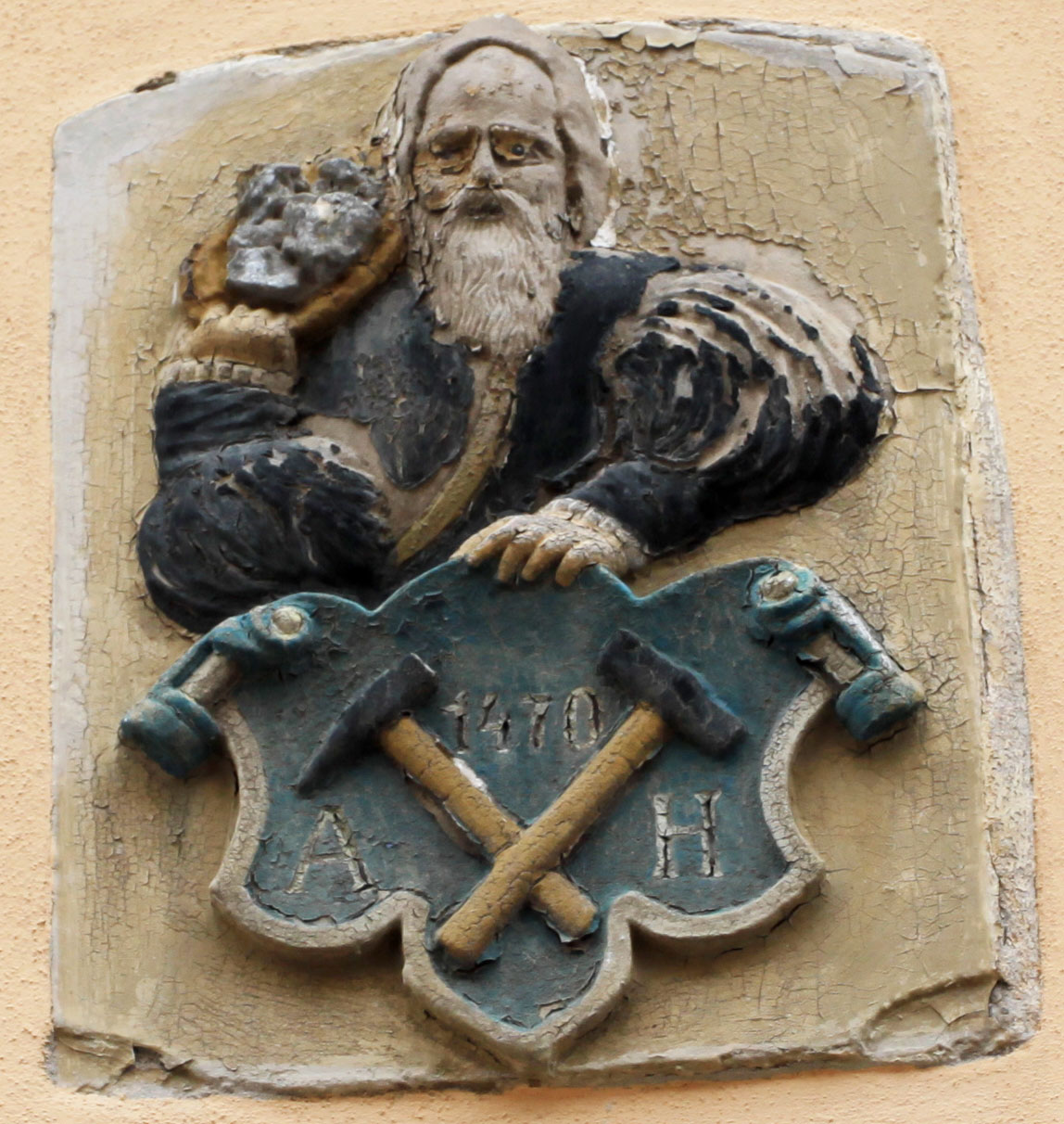 Bergmann mit geschultertem Erztrog. Relief am Haus Fischerstraße 27 in Freiberg